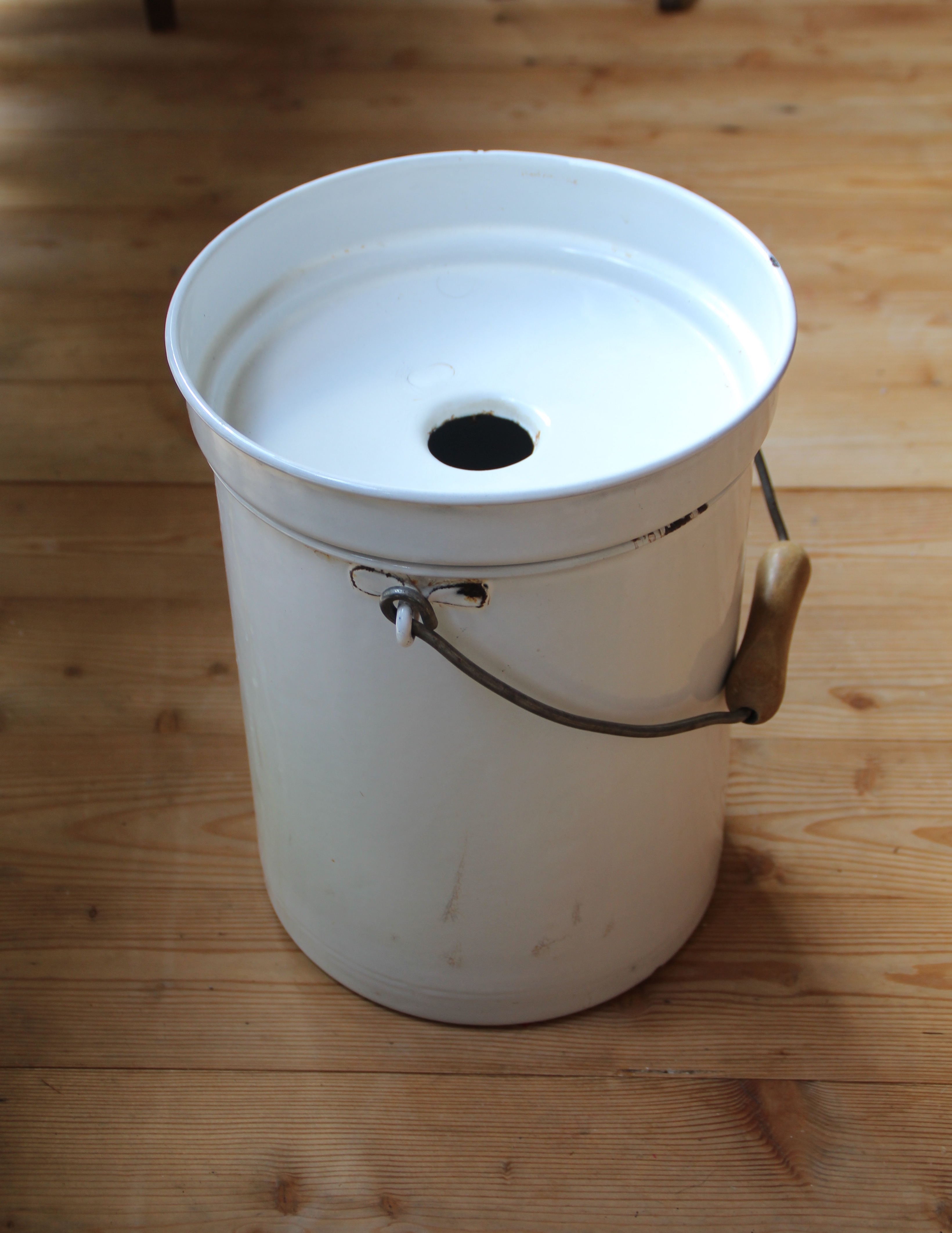 Nachttopf emailliert